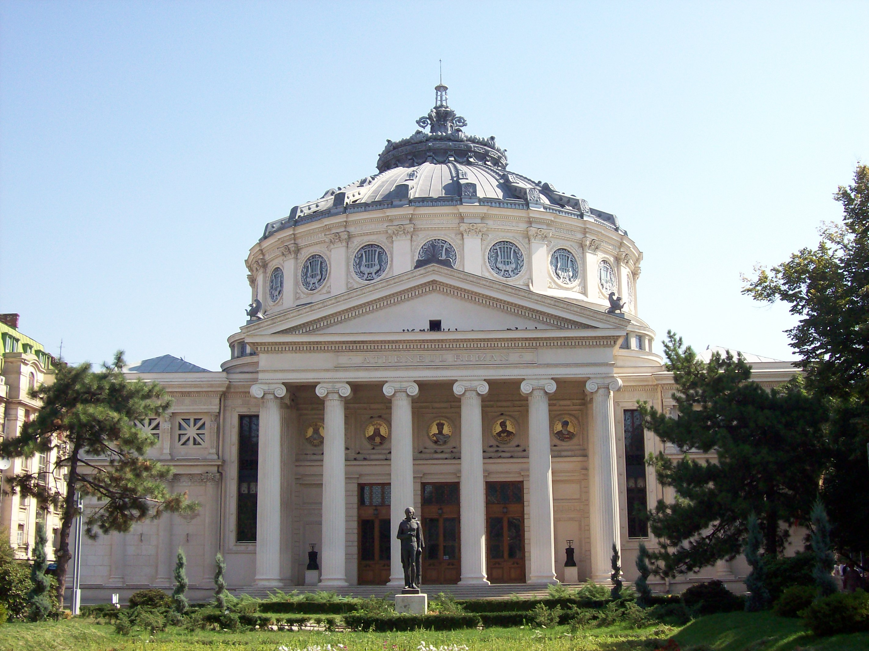 Die bronzene Statue des Mihai Eminescu vor dem Portal des Bukarester Athenäums. Statuia de bronz a lui Mihai Eminescu în faţa Ateneului Român din Bucureşti.